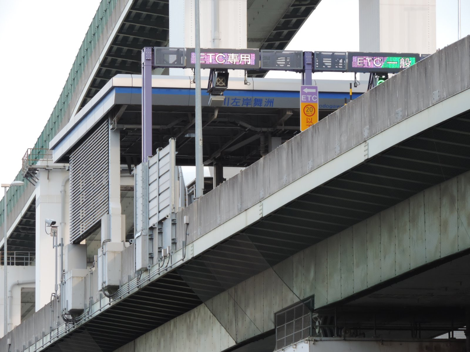 淀川左岸舞洲入口の料金所。